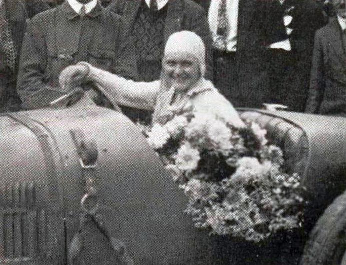 Elisabeth Junek en 1927.